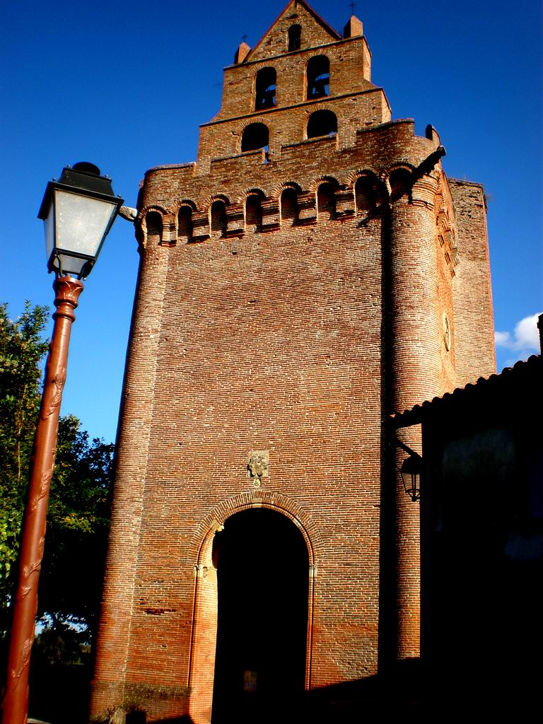 Église Notre-Dame-de-l'Assomption à Montgeard